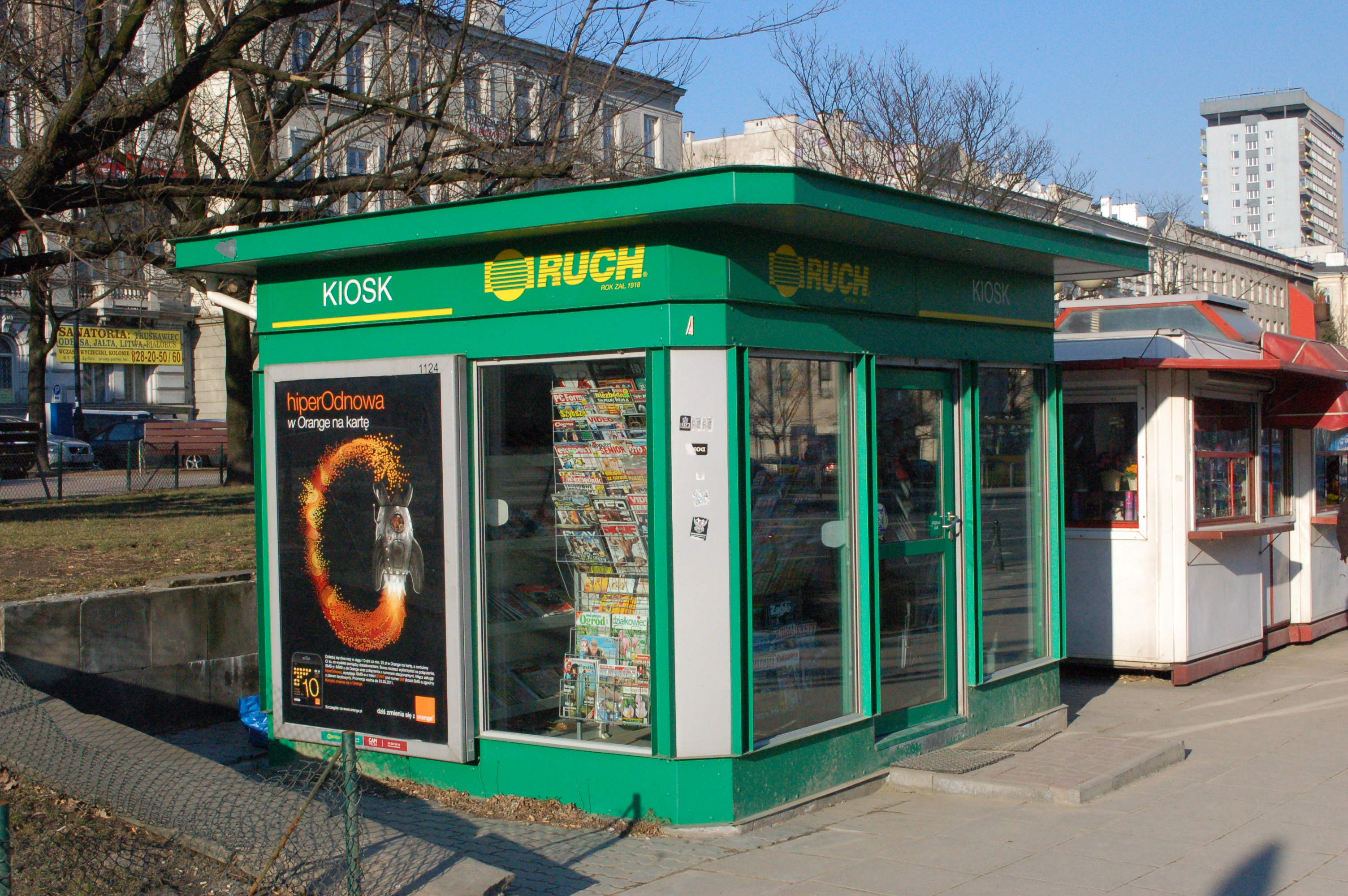 RUCH press outlet at Rondo de Gaulle, Warsaw